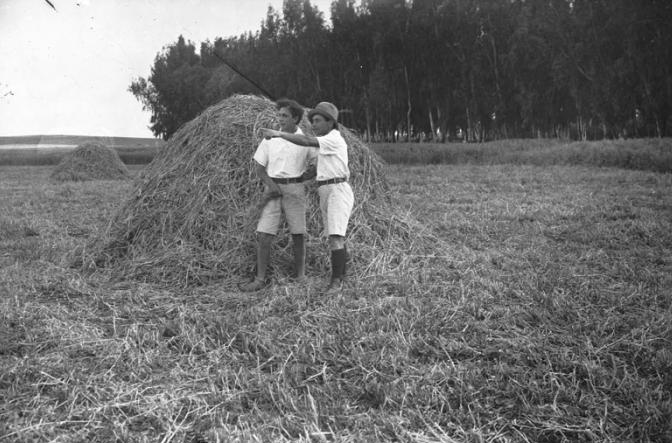 פועלים בגורן בחדרה. בחדרה היתה הגורן הגדולה ביותר במושבות. ברקע יער חדרה